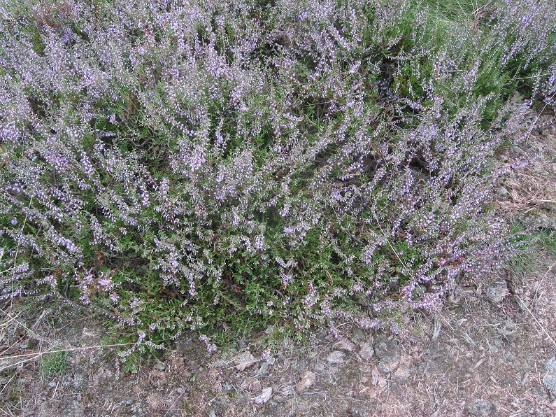 Calluna vulgaris